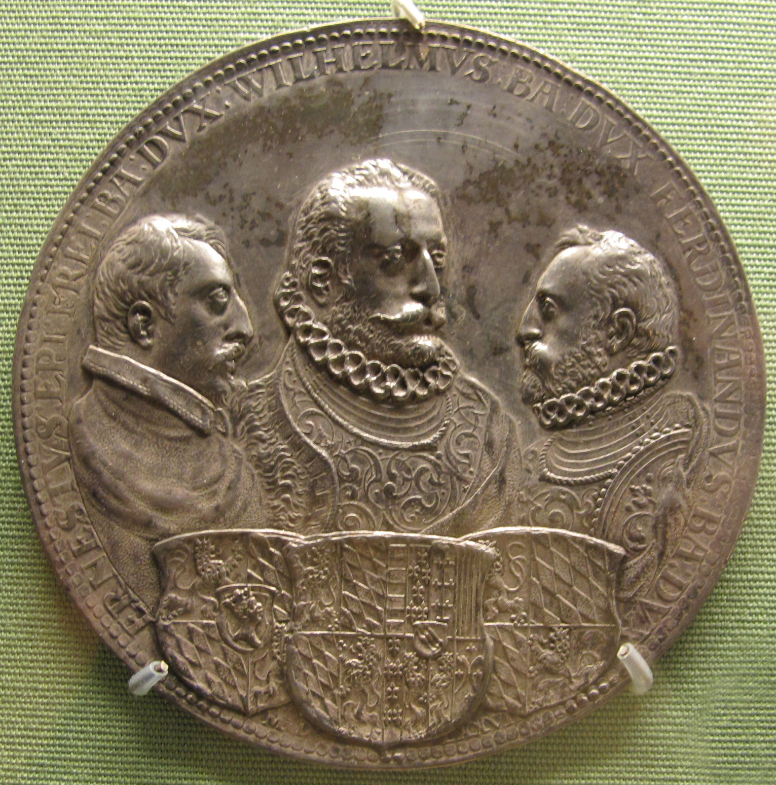 Ignoto, duchi ernst, wilhelm e ferdinand di wittelsbach, argento, 1577